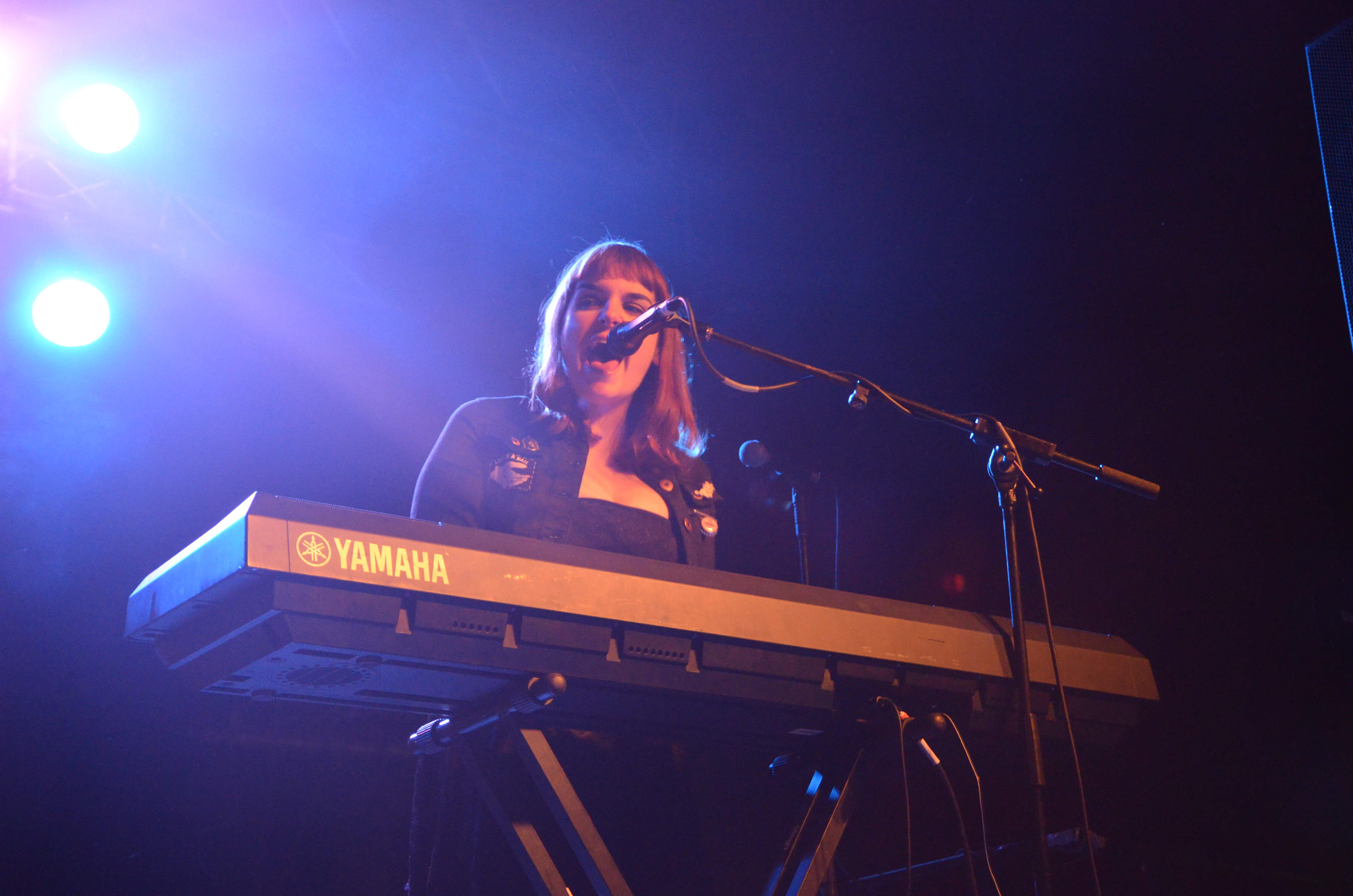 Creeper spielen in der Live Music Hall in Köln, 2016.